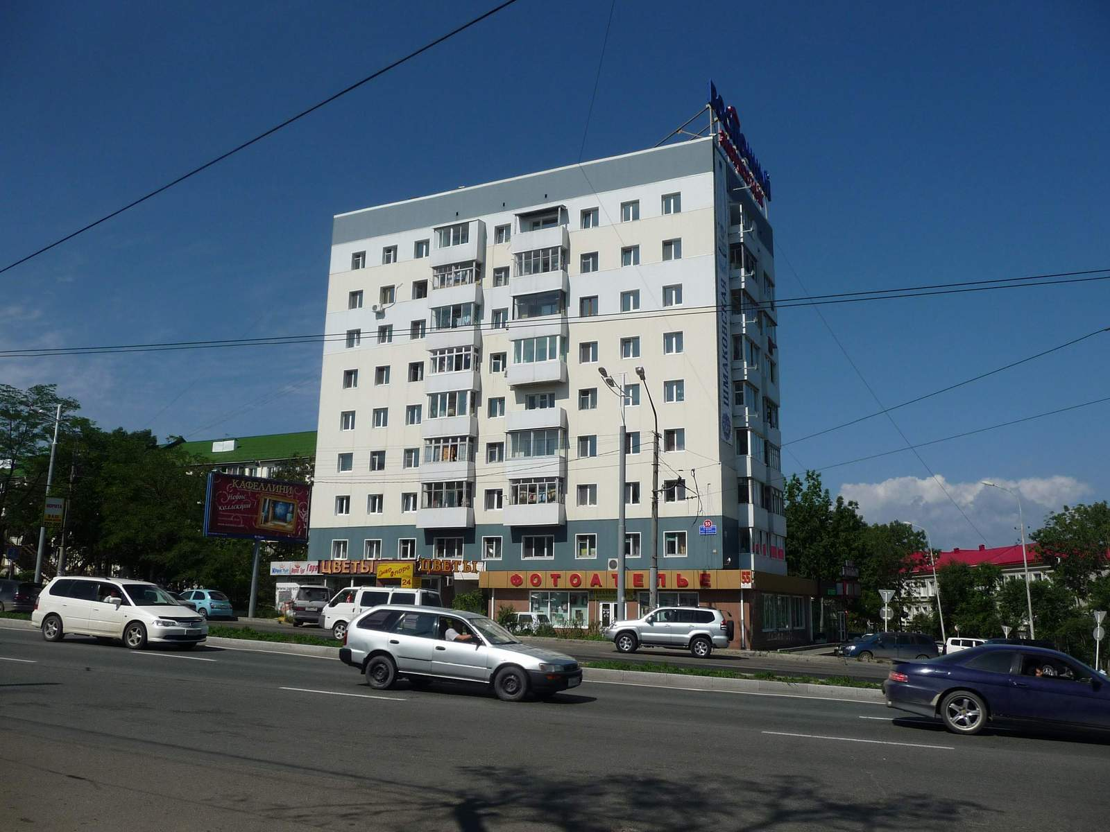 Первый 9-этажный дом во Владивостоке (пр. Столетия Владивостока, 55). К саммиту АТЭС 2012 г. дом (как и многие другие дома, выходящие на проспект) был облицован пластиковой вагонкой и изрядно изменил свой внешний вид. Построен в 1965 году, съёмка 2013-08-24.